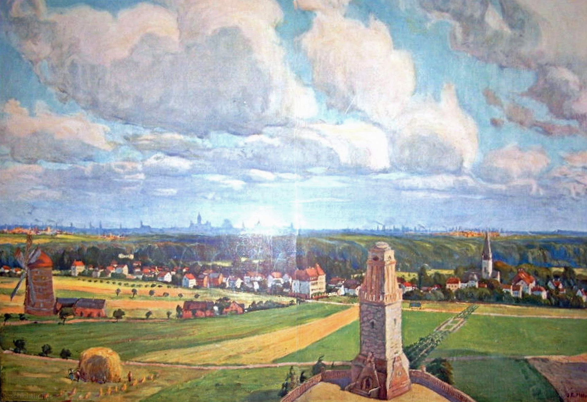 Rundblick über den geplanten Bismarckturm bei Hänichen (rechts) nordwestlich von Leipzig